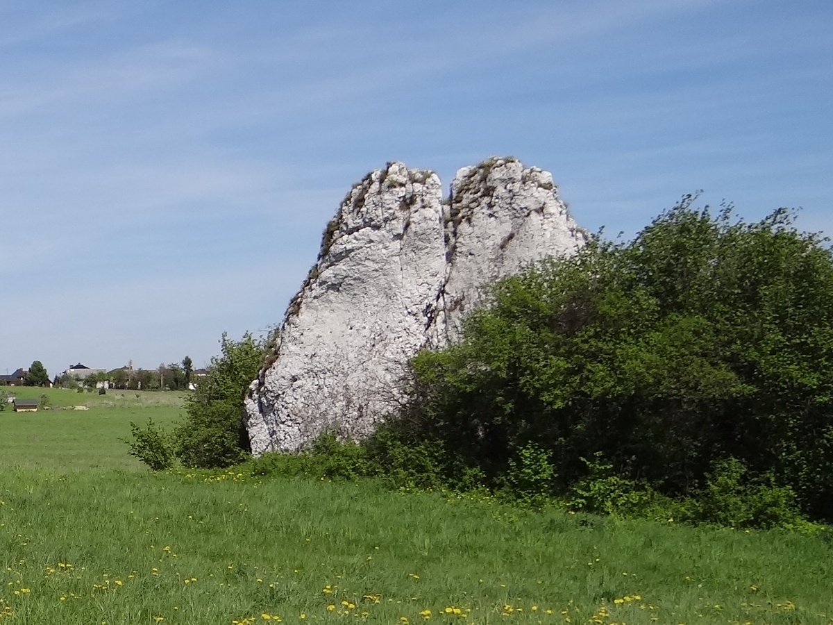 Ostry Kamień w grupie Ostańców Jerzmanowickich